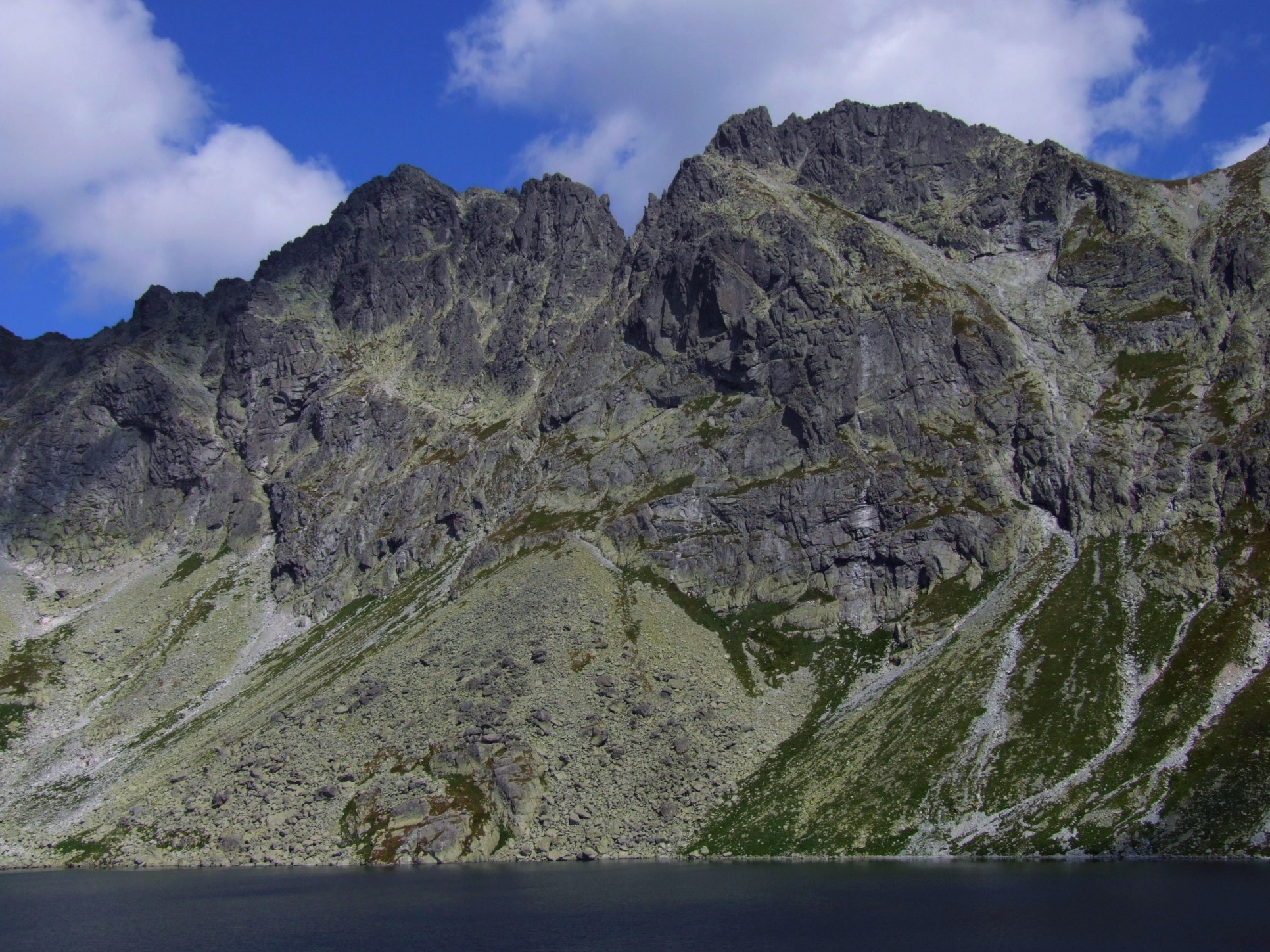 Mięguszowieckie Szczyty (od lewej: Mięguszowiecki i Pośredni) od strony Doliny Hińczowej